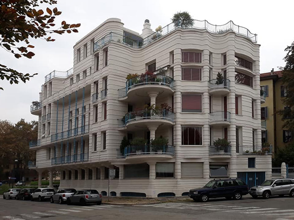 Casa dell'Obelisco, piazza Crimea 2 - Torino